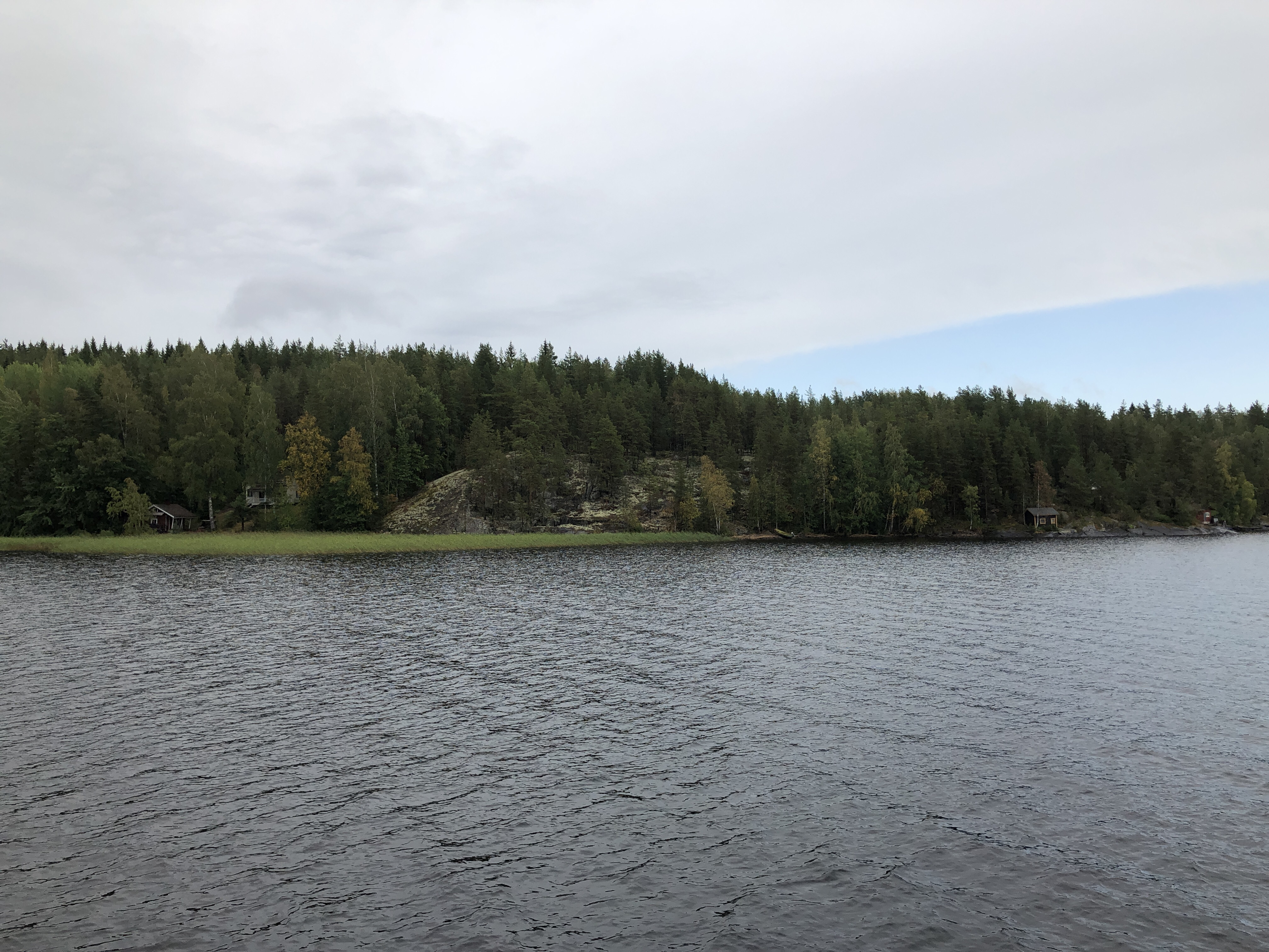 Iso-Poro